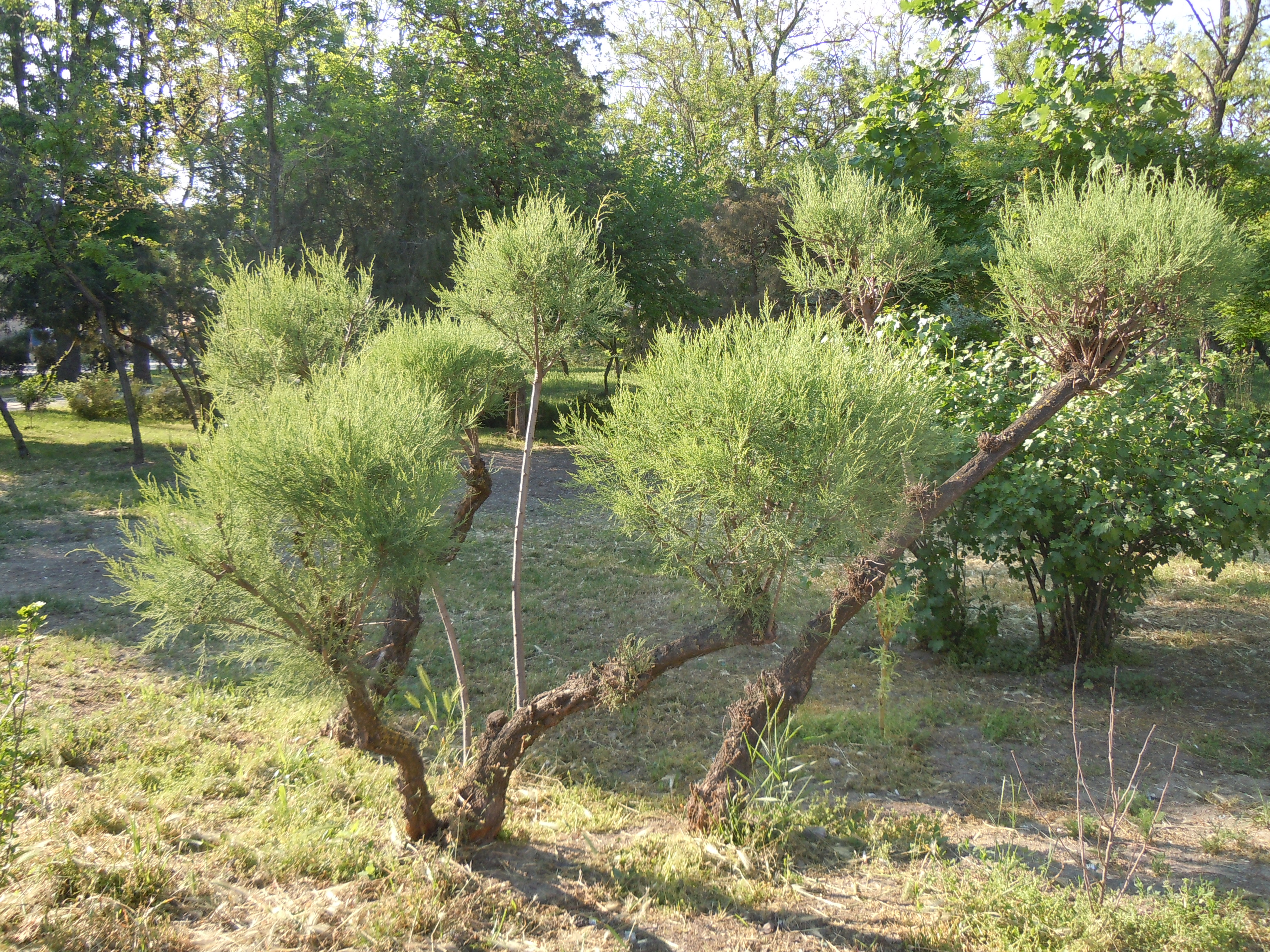 Парк ім. Котовського, м. Одеса, Миколаївська дорога, 172 а